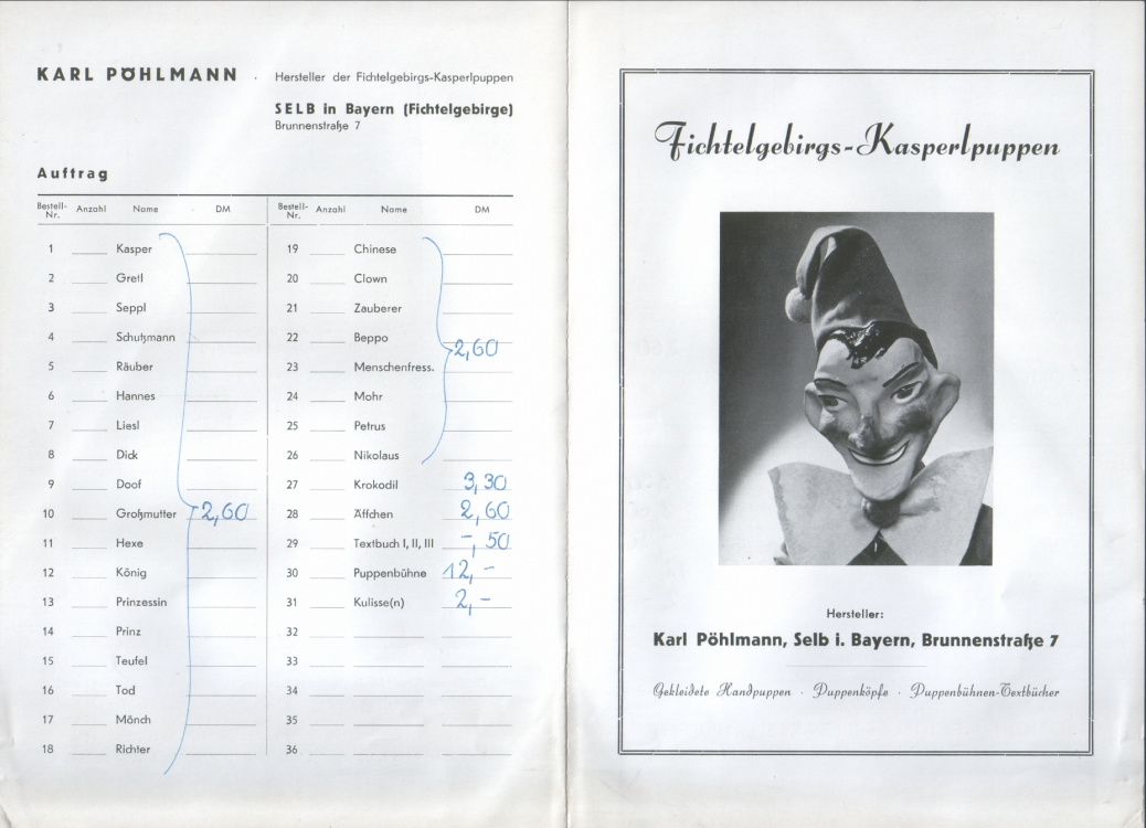 Preisliste 1950er Jahre, Privatbesitz, 1950er Jahre